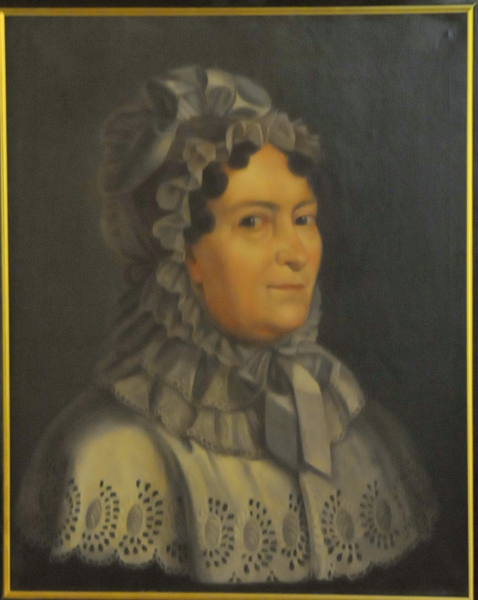 Porträt von Sabine Elisabeth Arnoldi, Mutter von Ernst-Wilhelm Arnoldi